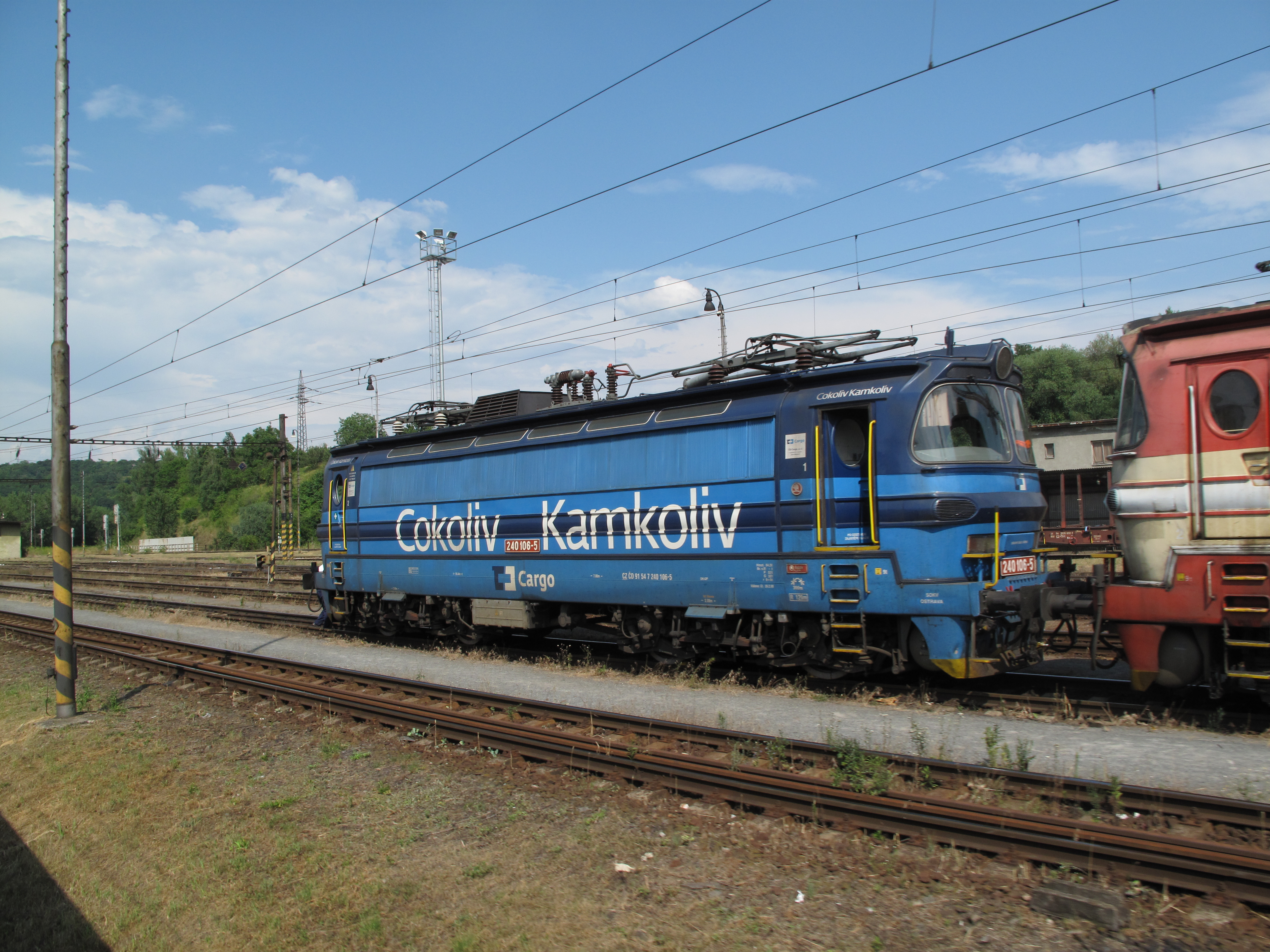 Lokomotiva 240 v Brně